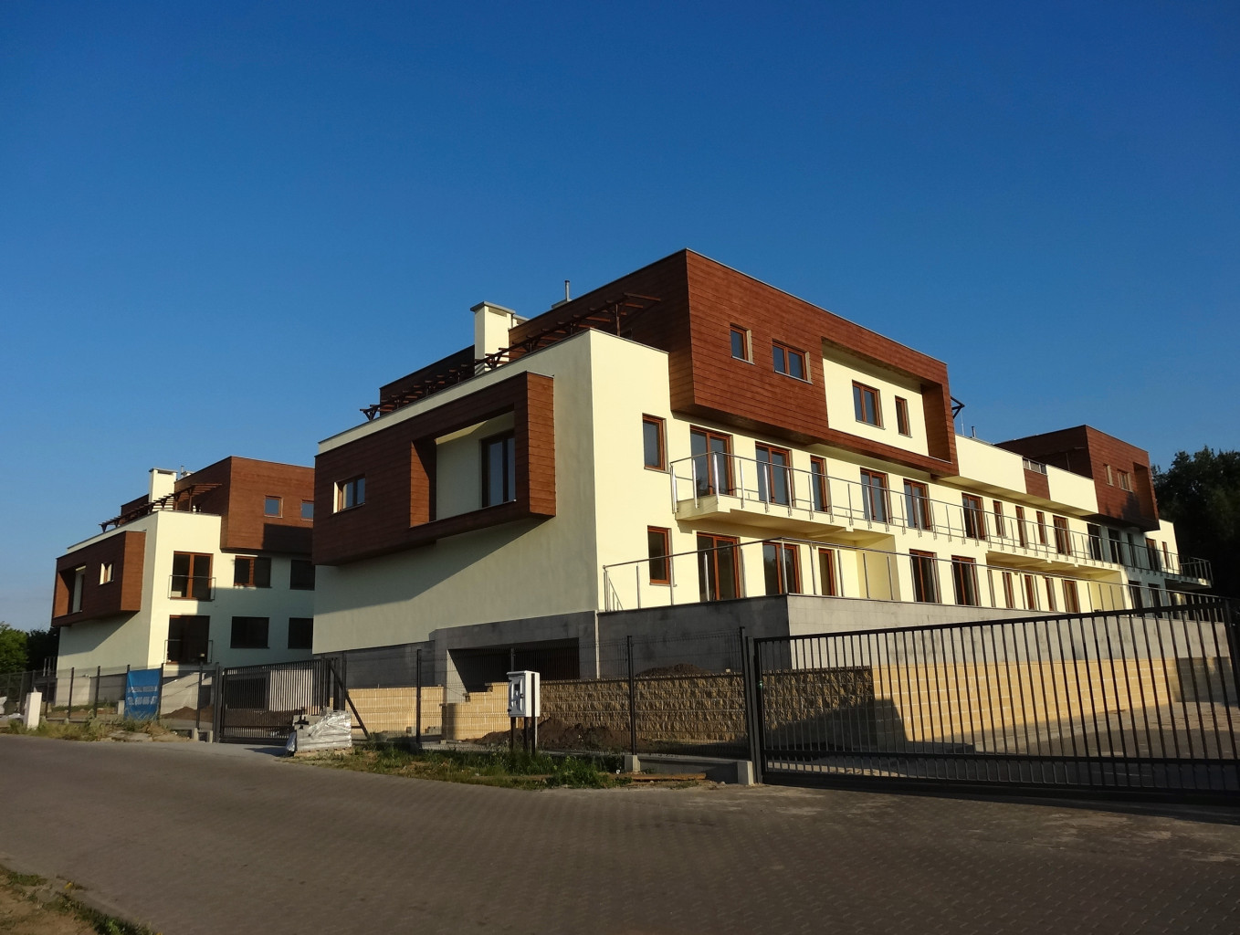 Osielsko, gmina Osielsko, powiat bydgoski